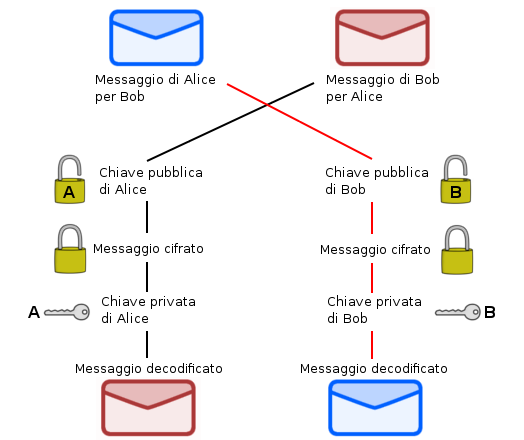 L'autore dell'immagine è Paolo Di Febbo (il sottoscritto). Ogni parte dell'immagine (buste della posta, chiavi, lucchetti) è stata realizzata dal sottoscritto. E' uno schema esplicativo del funzionamento della crittografia asimmetrica intuitivo da capire. Il lavoro è rilasciato sotto licenza Creative Commons 2.0 BY-SA.